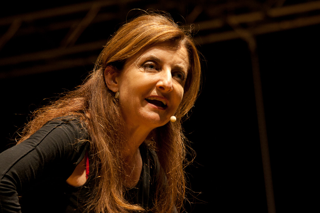 Francesca Reggiani a "Cambia il vento" Festa dell'Unità d'Italia 2011 - Terme di Caracalla